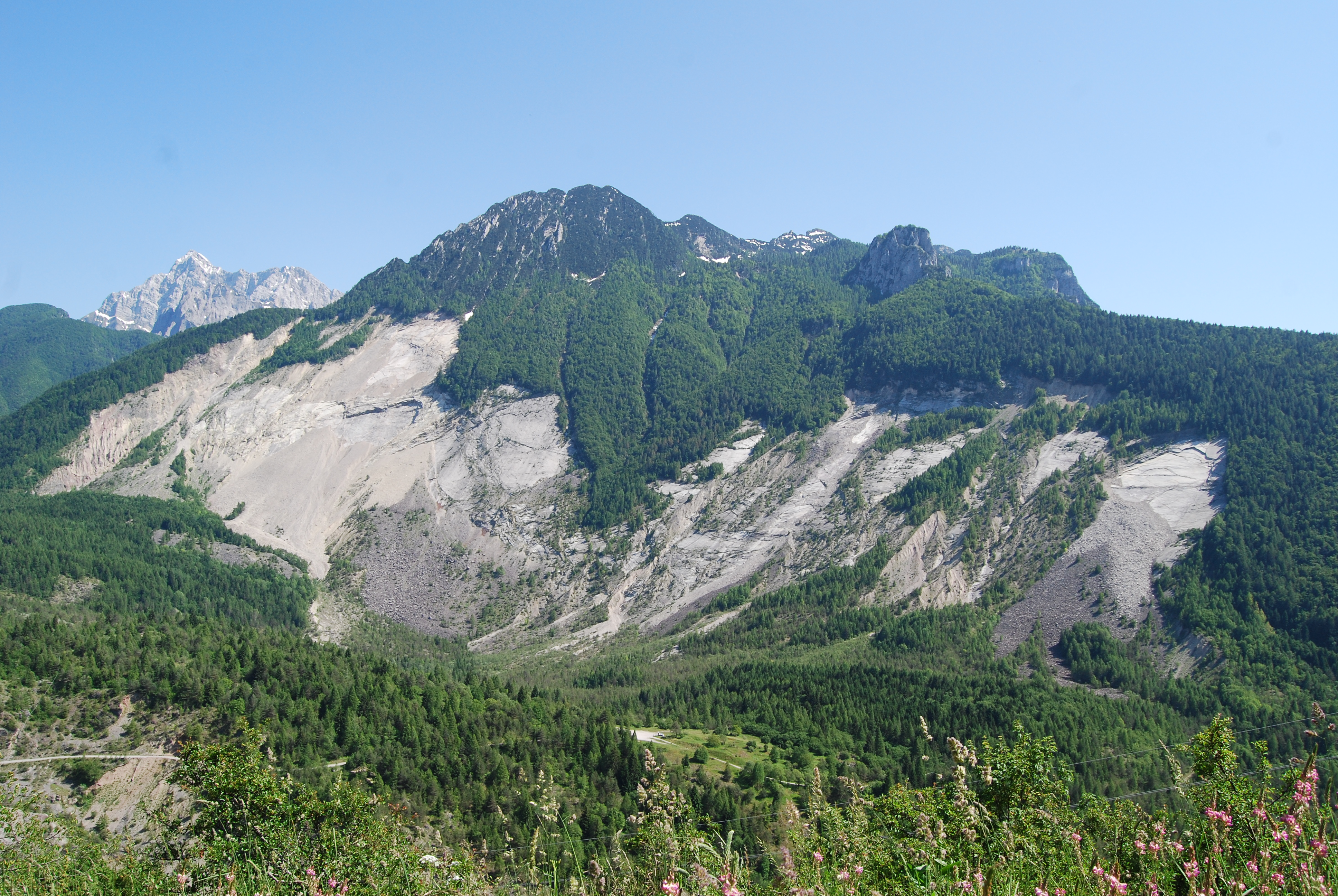 piano di scivolamento della frana del monte Toc nella valle del Vajont